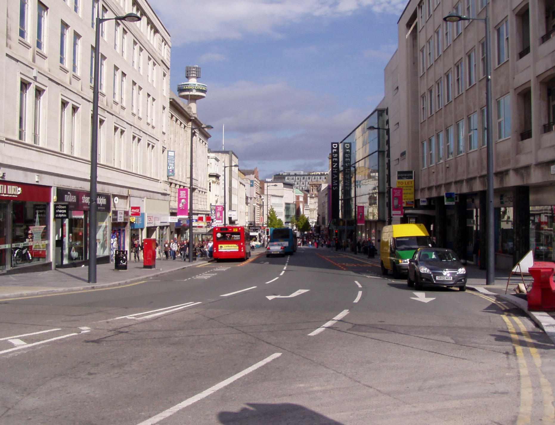 Lord Street, Liverpool